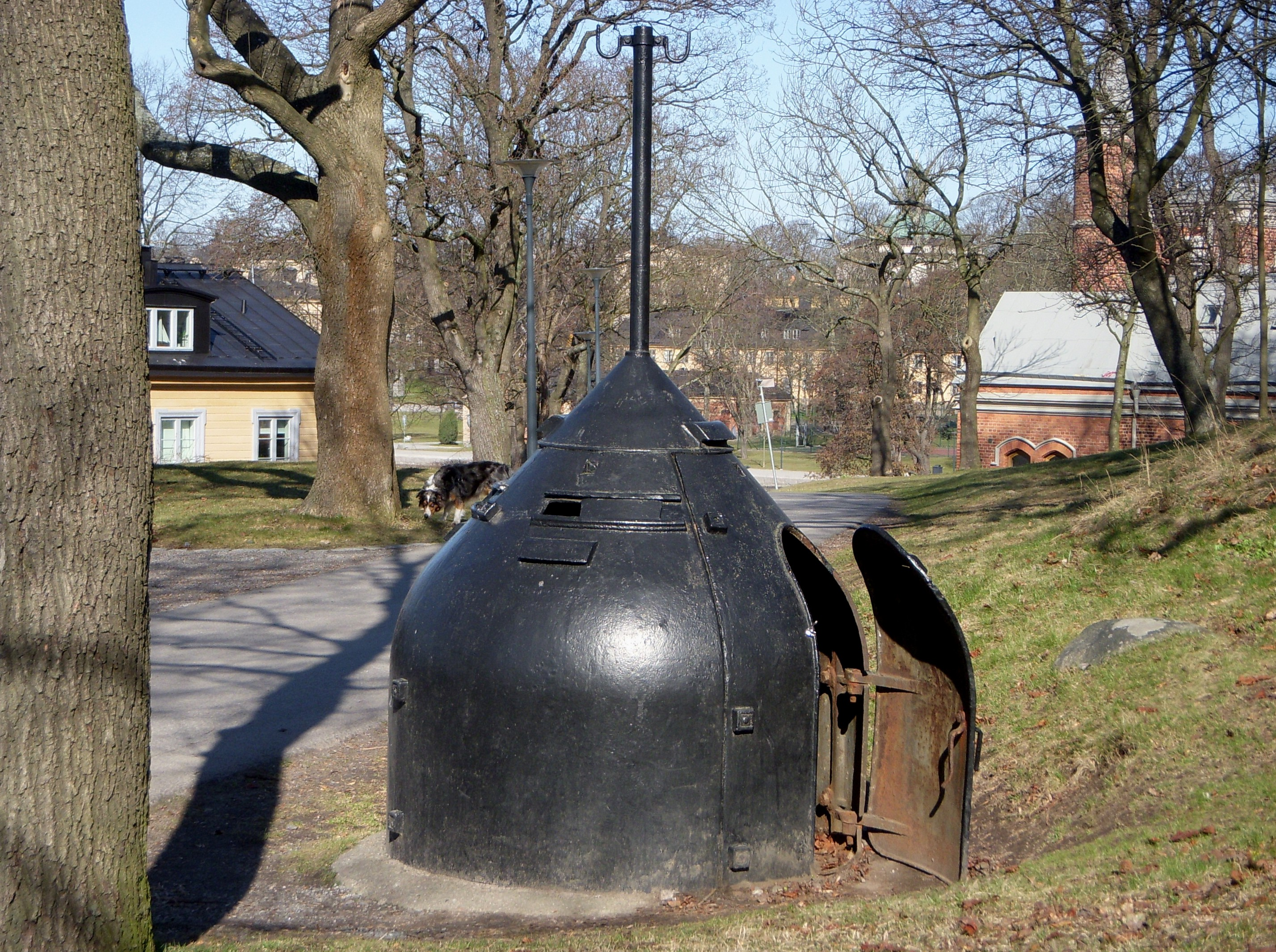 Värn på Kastellholmen